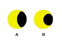 AUTHOR: Francisco Javier Blanco González Made by Paint and x2y Magnitud y oscurecimiento de un eclipse solar